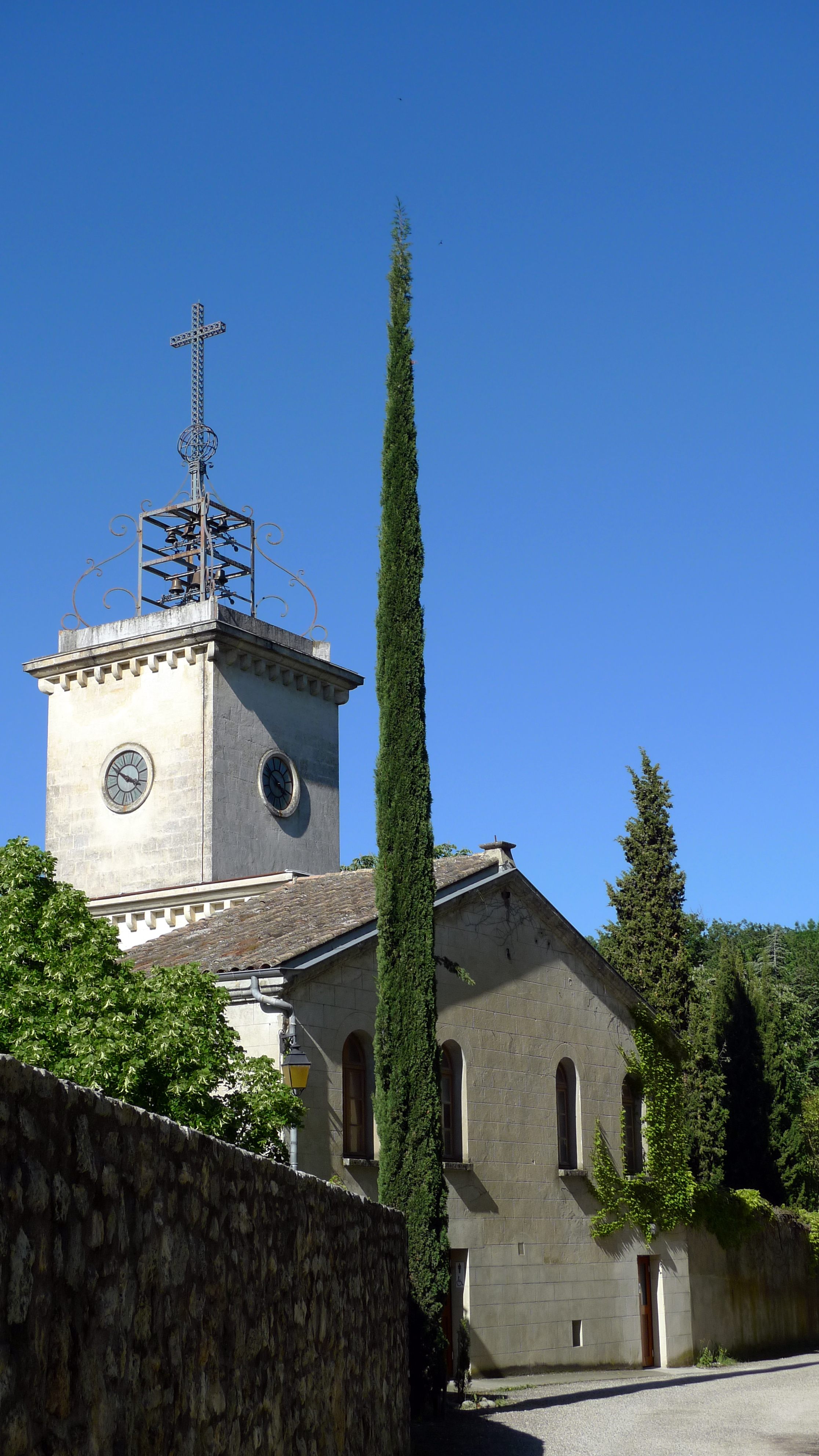 Entrée de l'abbaye cistercienne Notre-Dame d'Aiguebelle